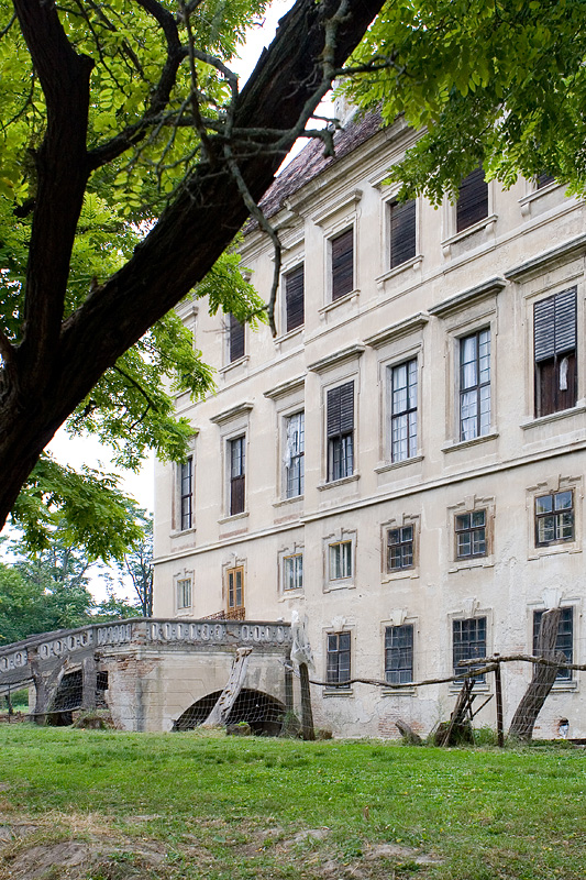 Schloss Thürnthal, Niederösterreich